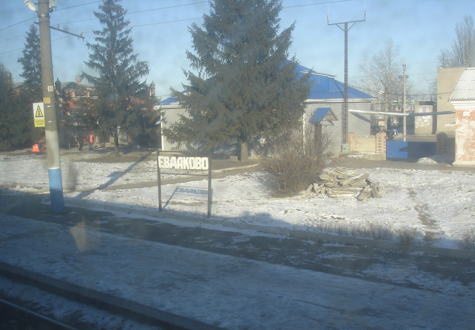 Здание ЖД-станции Евдаково